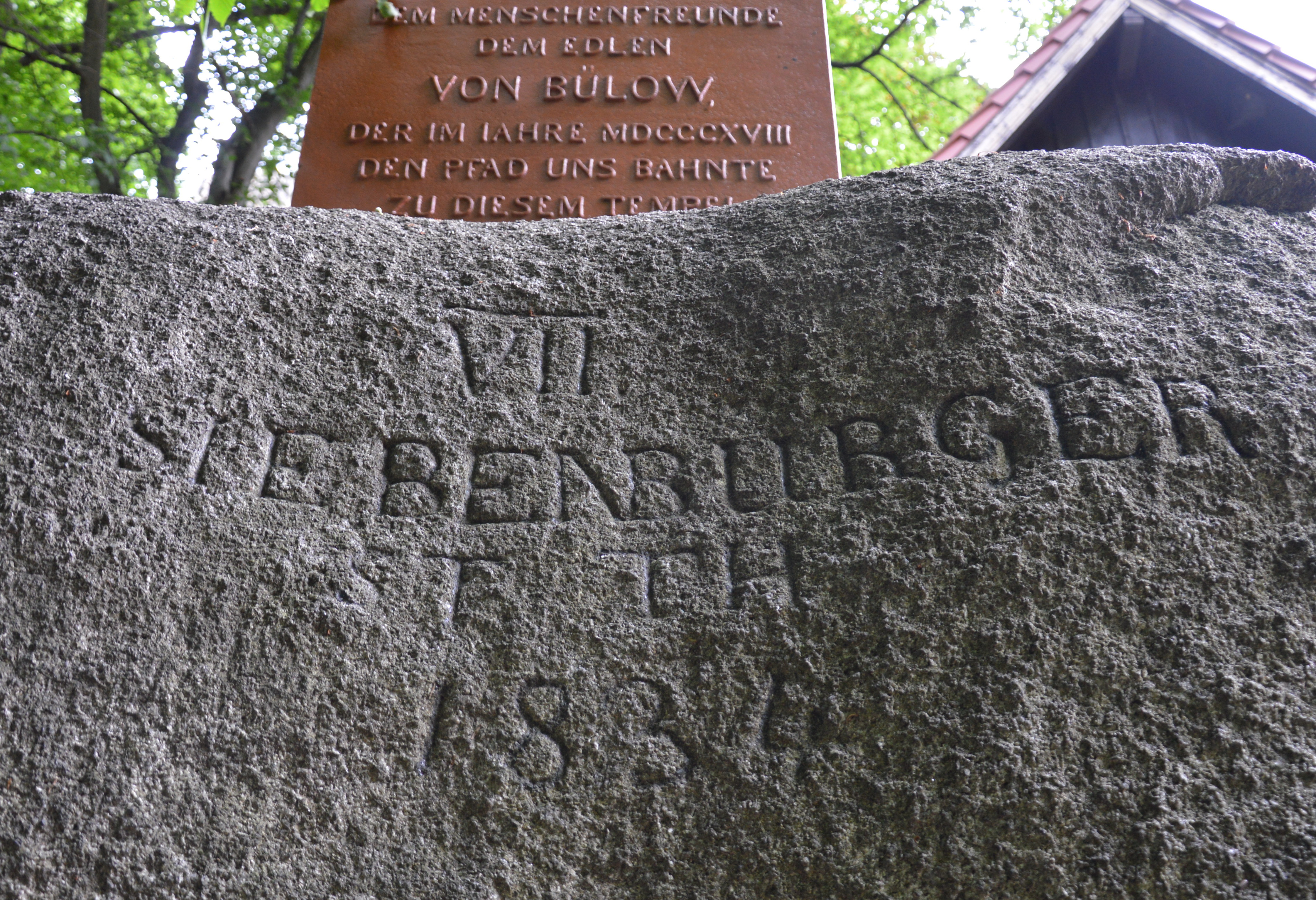 Bülowdenkmal Inschrift am Stein